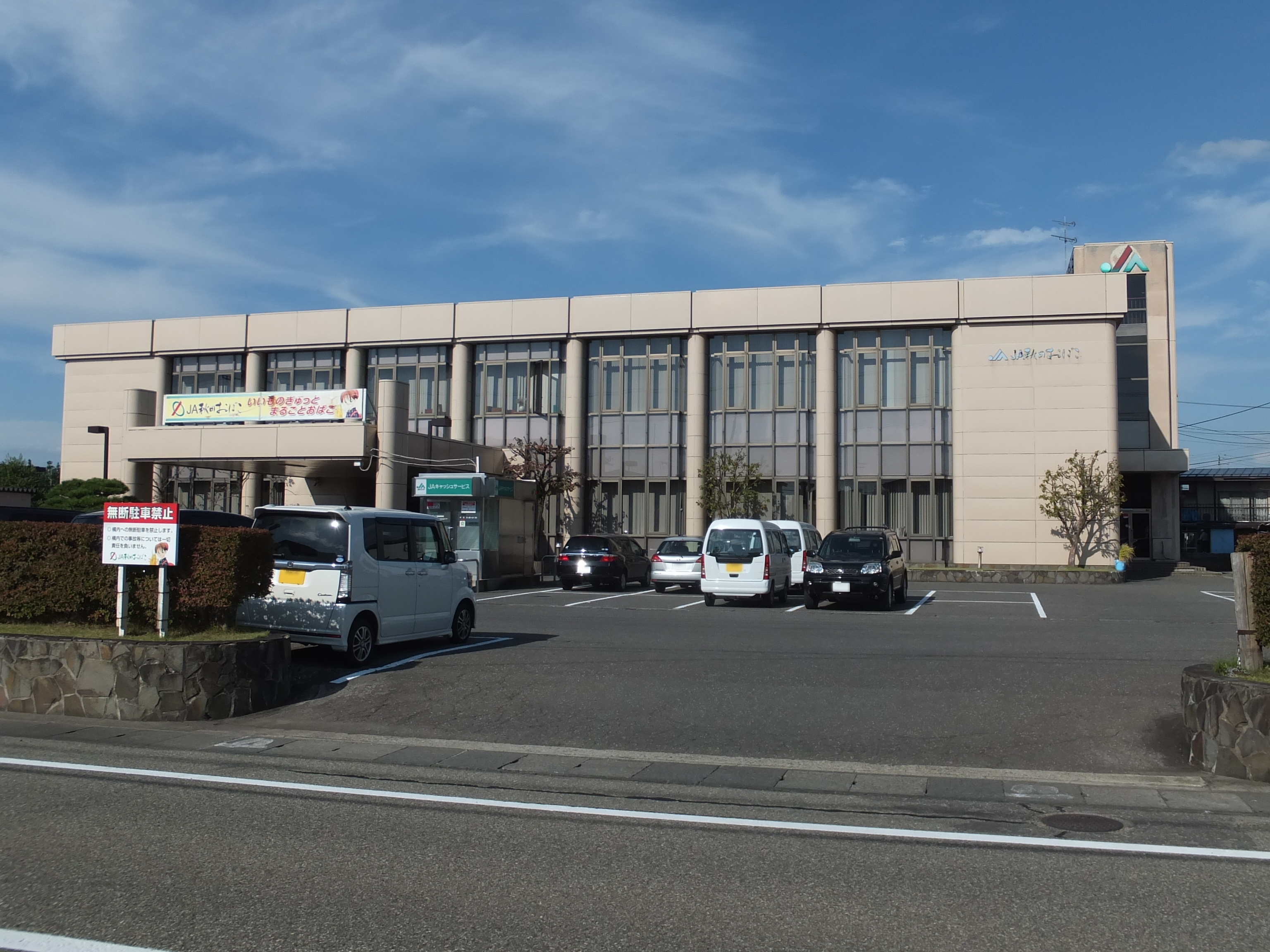 JA秋田おばこ本部